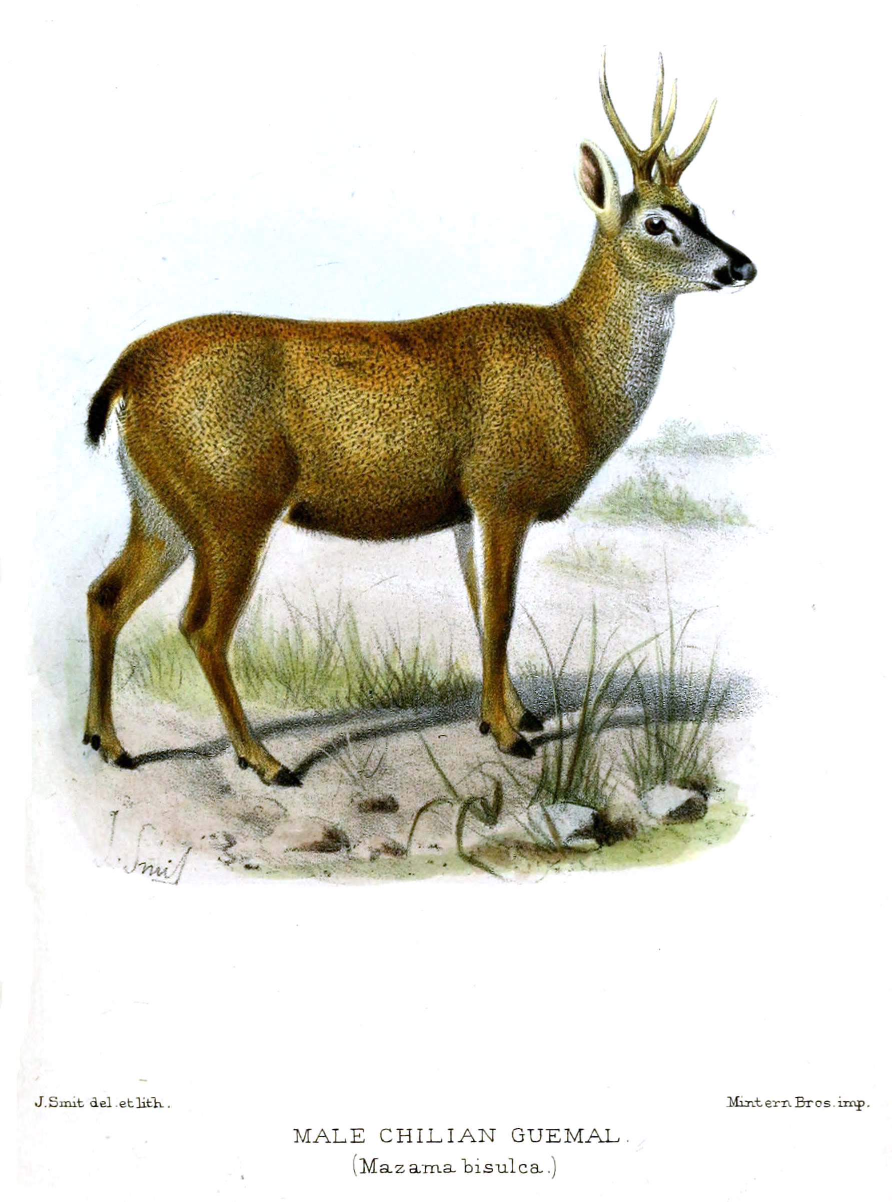 Mazama bisulca = Hippocamelus bisulcus